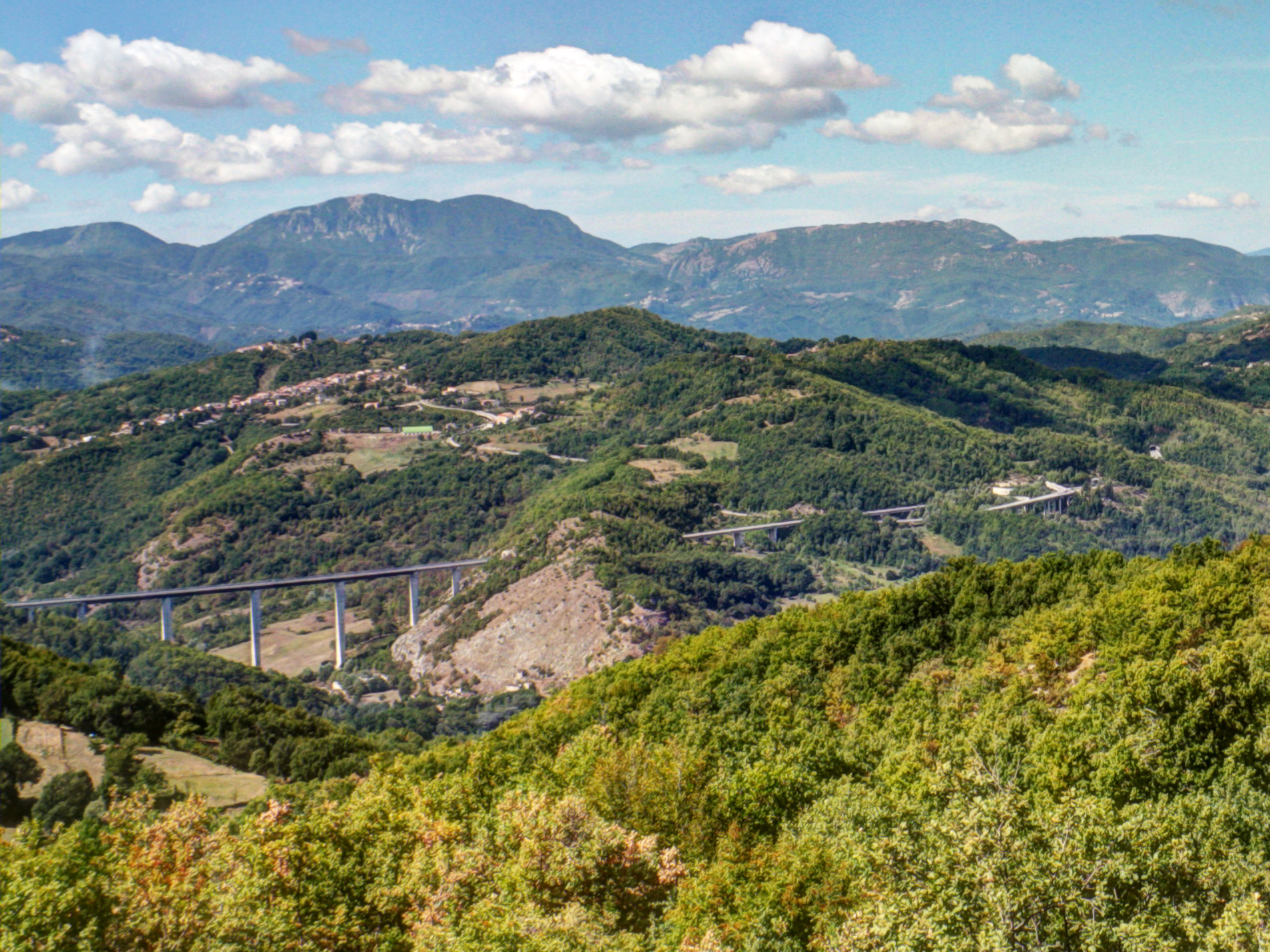 La superstrada Rieti-Torano (strada statale 578 Salto-Cicolana) vista da Sant'Elpidio guardando verso il lago del Salto: si vedono (da sinistra a destra) il viadotto Rio Torto, la galleria Roccarandisi, i viadotti Pesci e Vicende, lo svincolo di San Paolo (comprensivo di un cavalcavia e di un tunnel) e infine l'imbocco della galleria Colle Sciarrata.